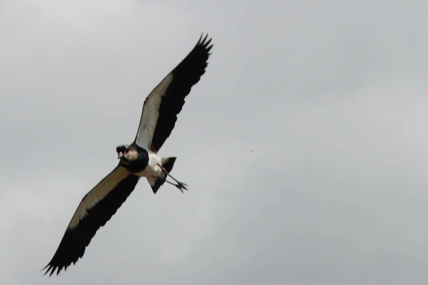 Foto de tetéu (Quero-quero) em vôo, preparando ataque para proteger o ninho. Foto realizada na cidade de Gravatá, Pernambuco, Brasil.